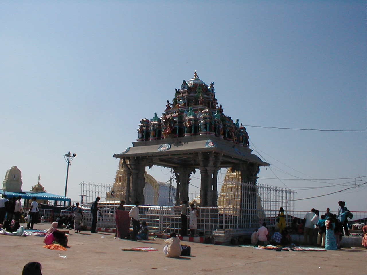 YadaGiri Gutta Photos